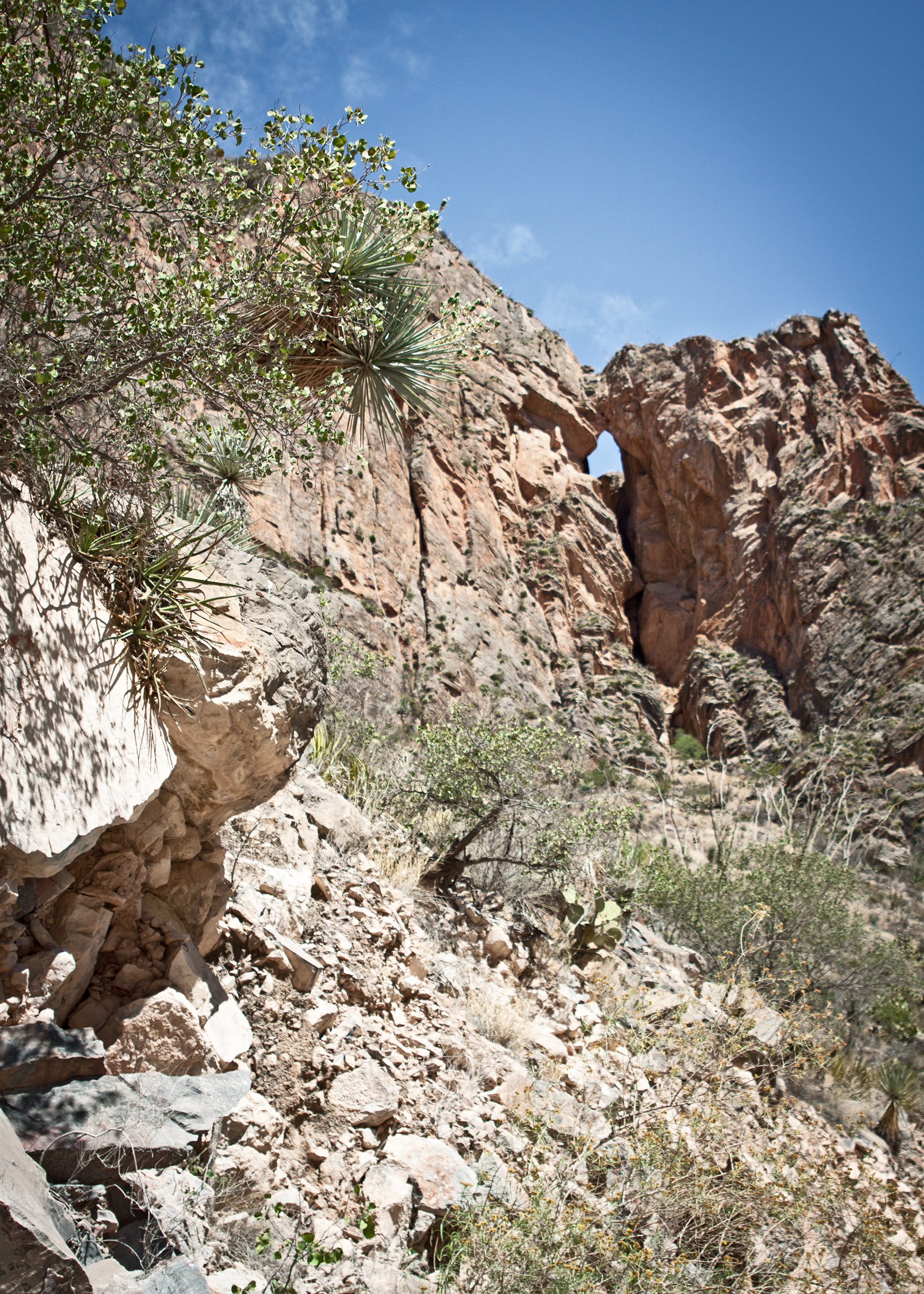 Cañón de Jimulco